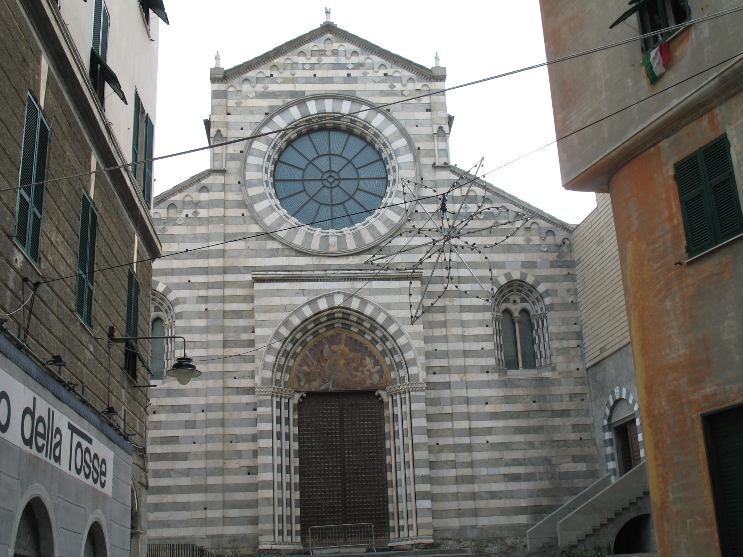 Immagine da Genova - La chiesa di Sant'Agostino in piazza Renato Negri. Adiacente al Museo di Sant'Agostino, e oggi sconsacrata, è talvolta sede di rappresentazioni teatrali del vicino Teatro della Tosse.